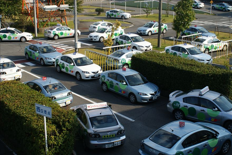 教習コースと教習車の風景